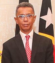 Botschafter Ilídio Ximenes da Costa bei der Vereidigung